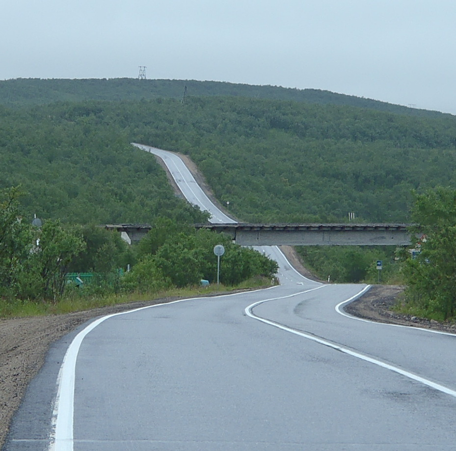 Путепровод железной дороги Нял — Заозёрск над автодорогой Кола